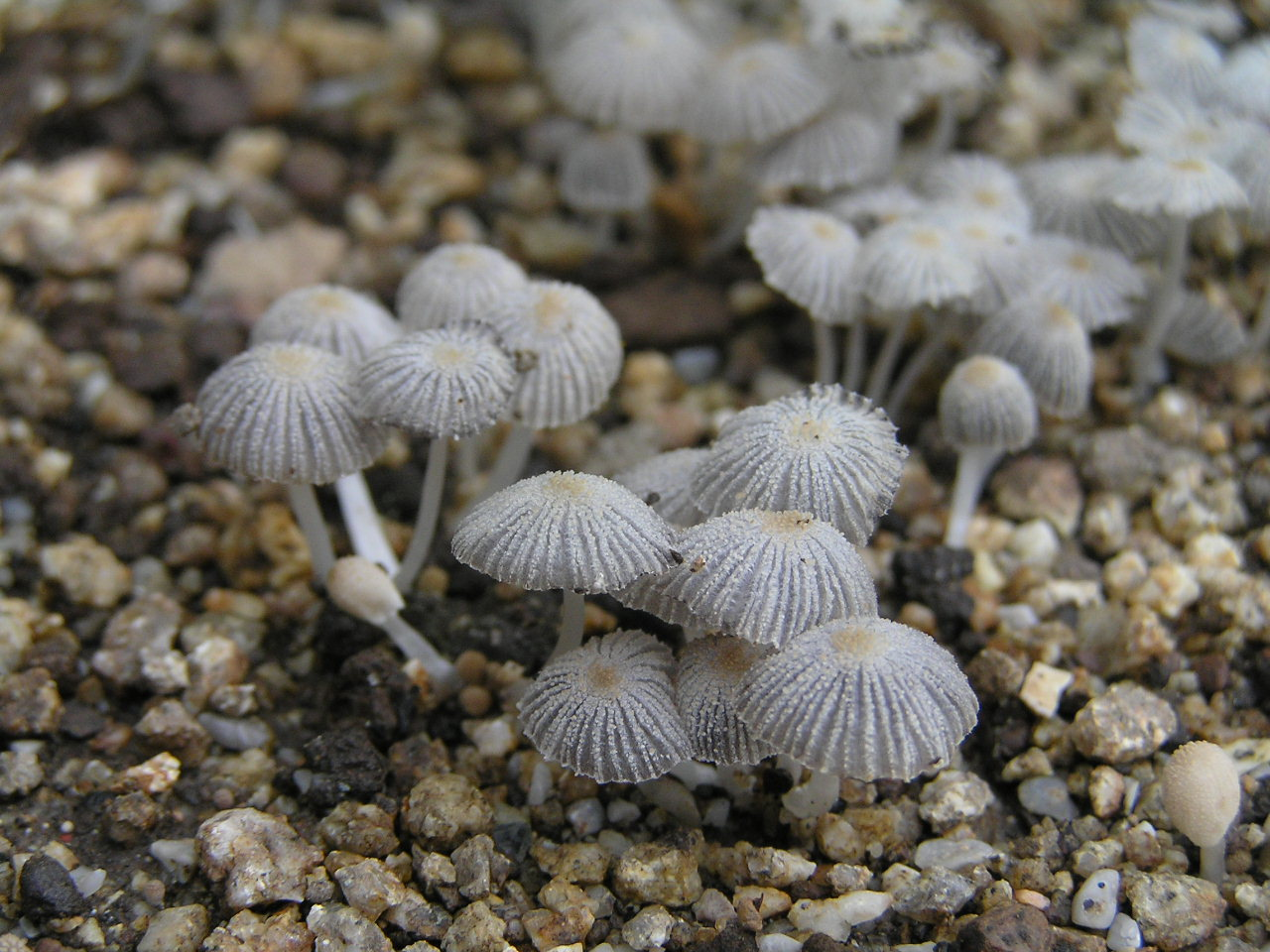 クズヒトヨタケ Coprinus patouillardii 発酵鶏糞を新たに撒いて耕したばかりの畑一面を真っ白に覆うように突如出現、数日後にはその名の通り見事に消え失せていた。 ～photo by Autumn Snake 【おぉたむ すねィく探検隊】写真・きのこ部門 担当 勅使河原 賢明 【クズヒトヨタケ関連ＨＰ】